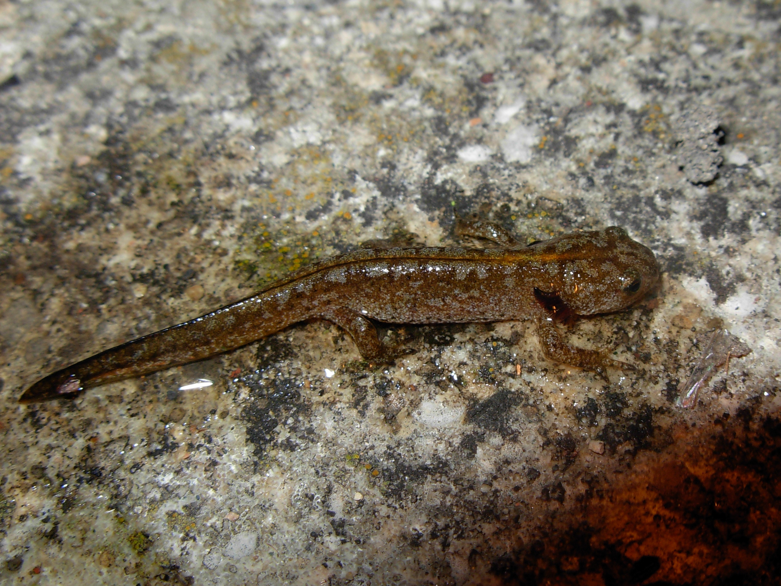 Triturus alpestris larva.